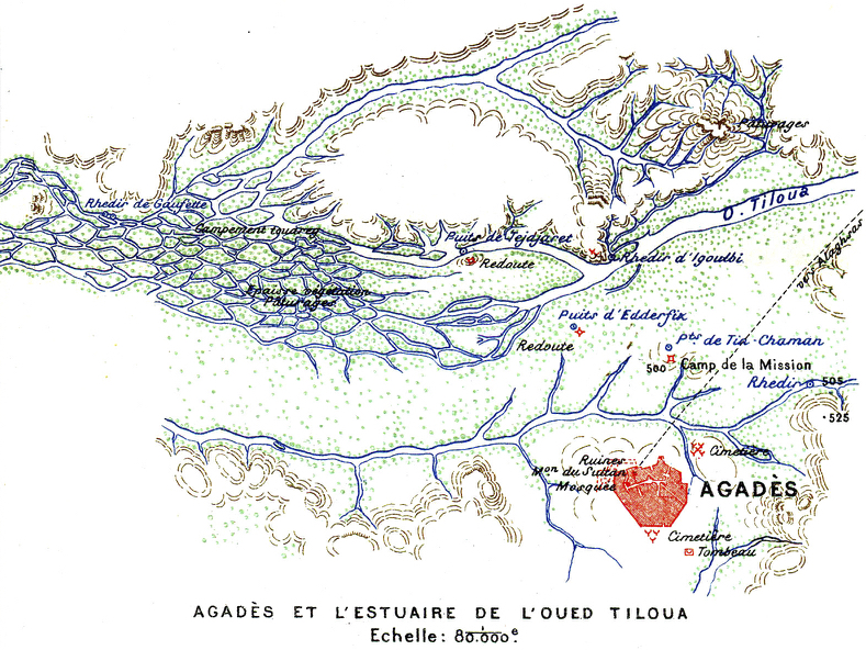 Mission Foureau-Lamy : Agadès et l'estuaire de l'oued Tiloua.